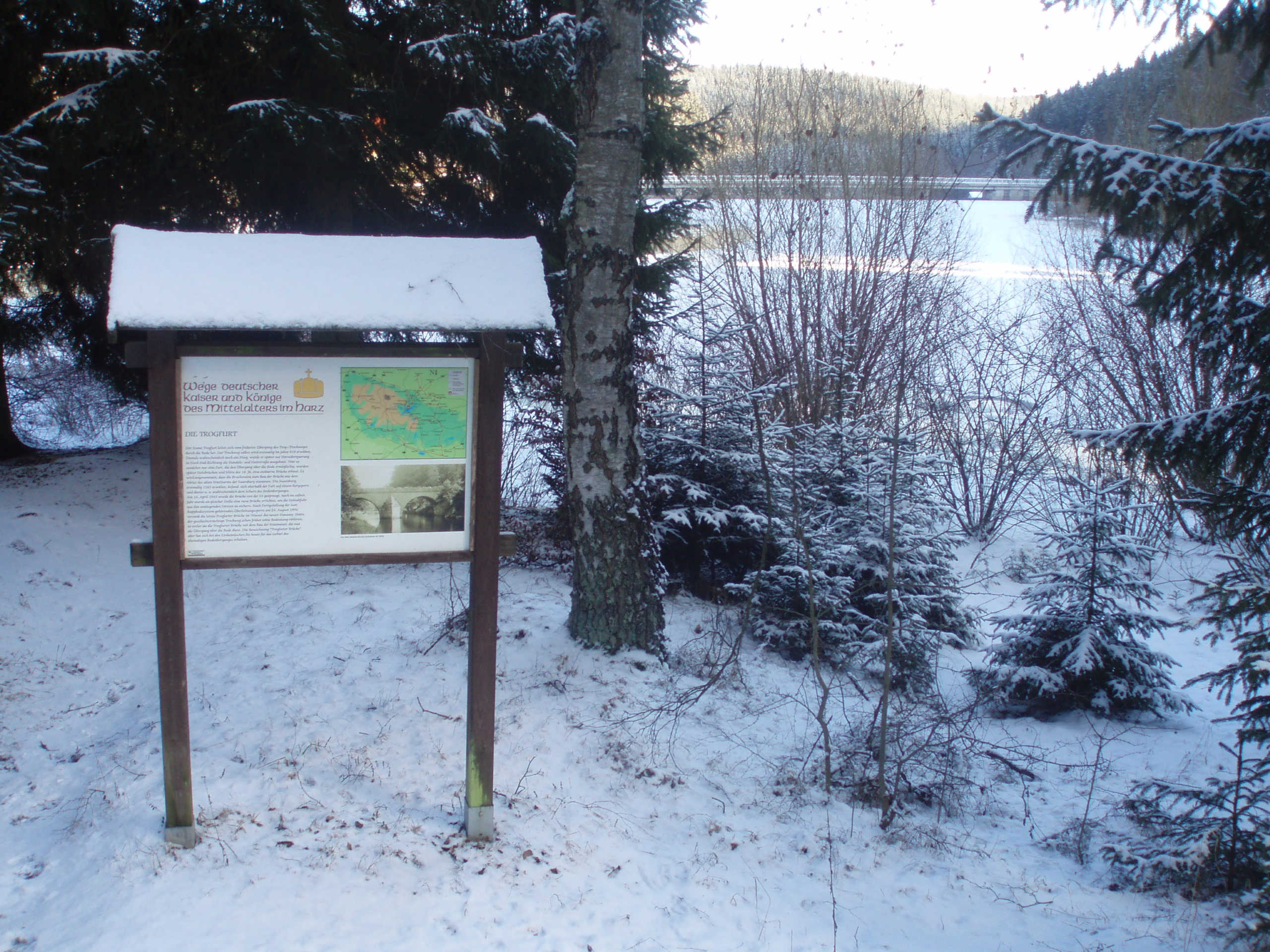 Trogfurt